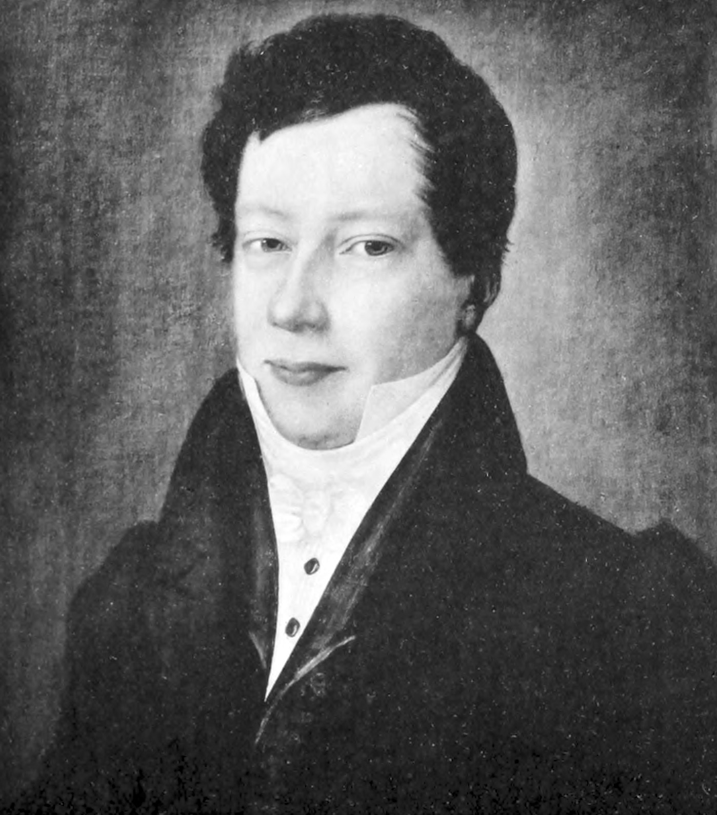 Johan August Liborius (1702-1870)